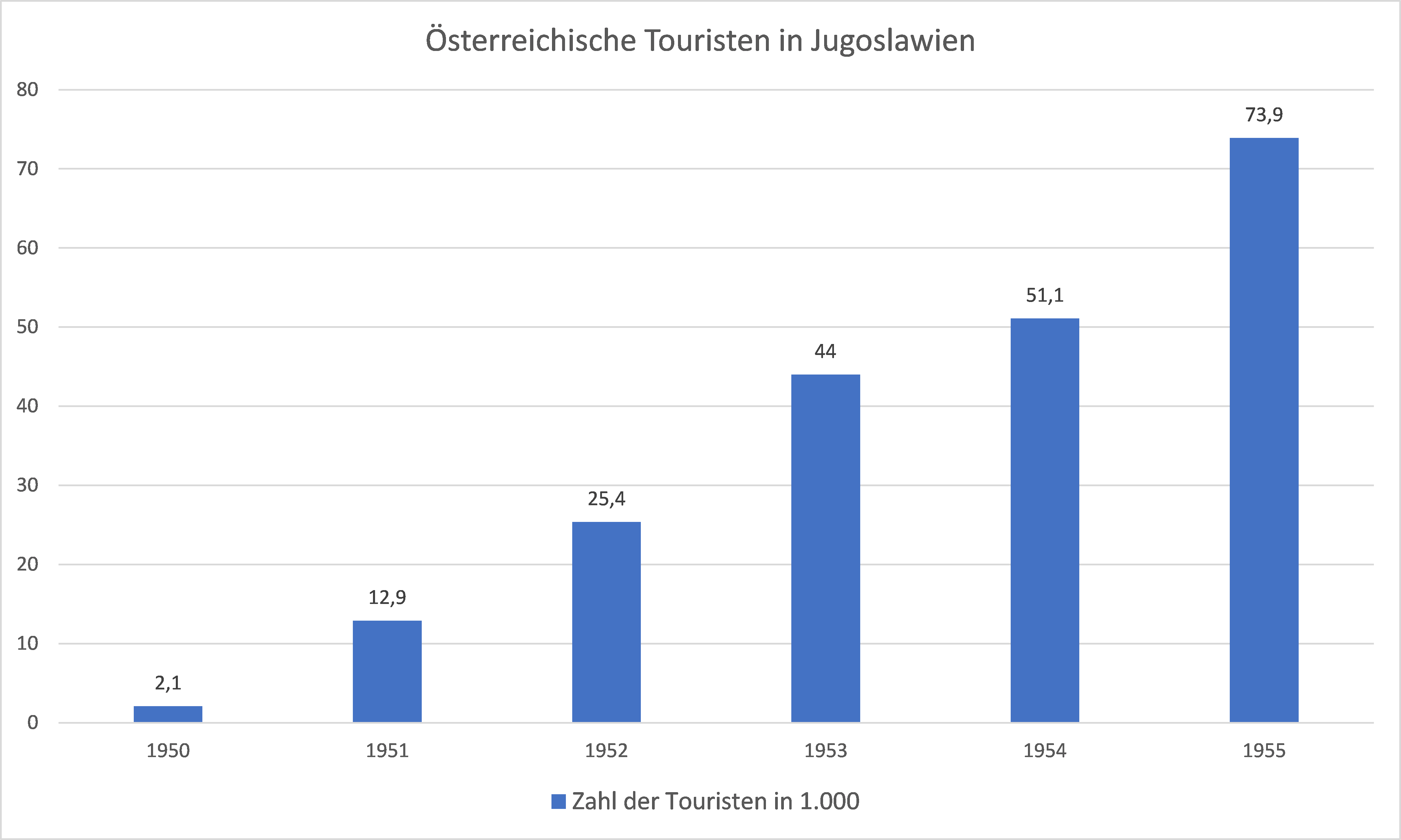 Zahl der Österreichischen Touristen in Jugoslawien